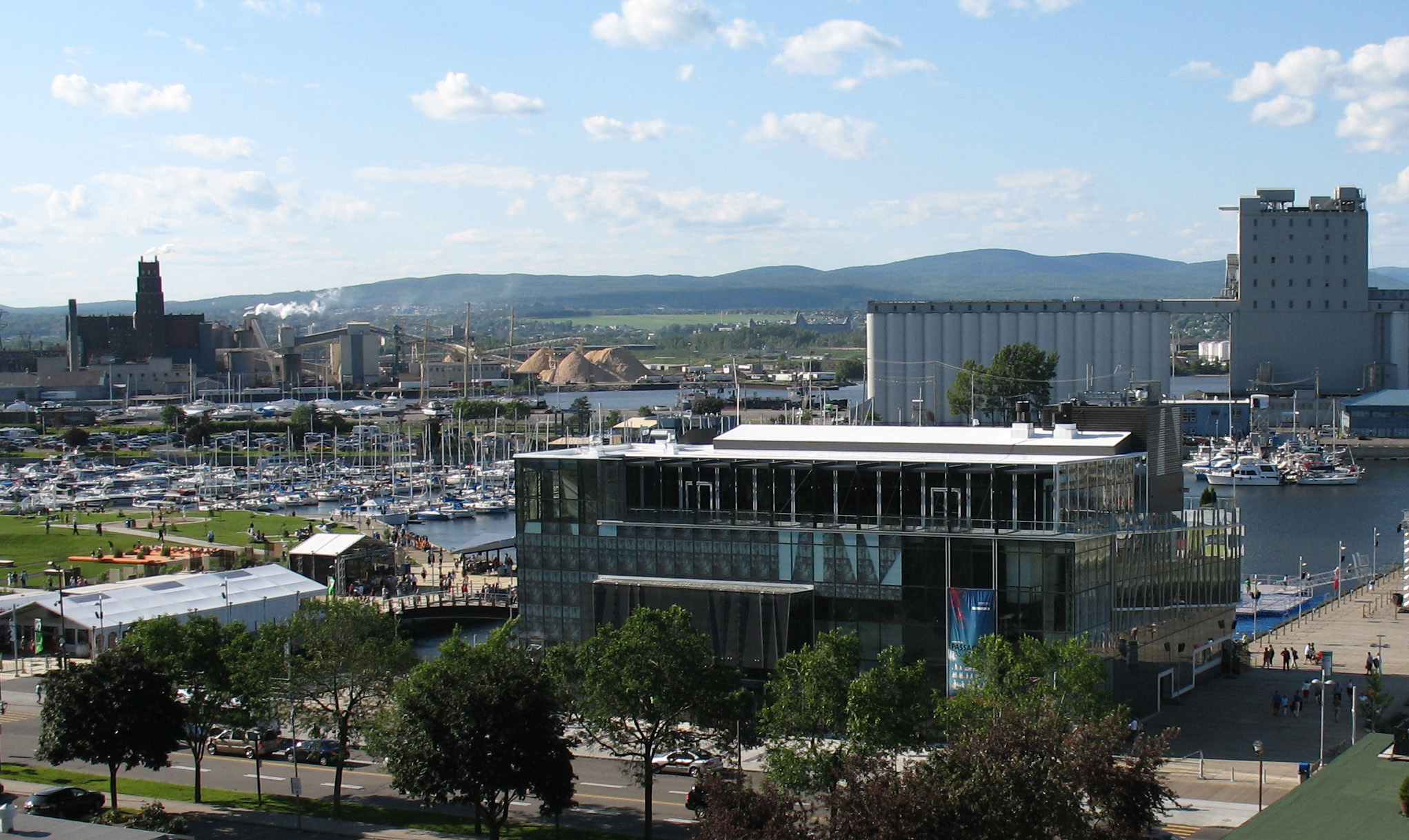 Québec, Espace 400e au Bassin Louise, Québec, Canada